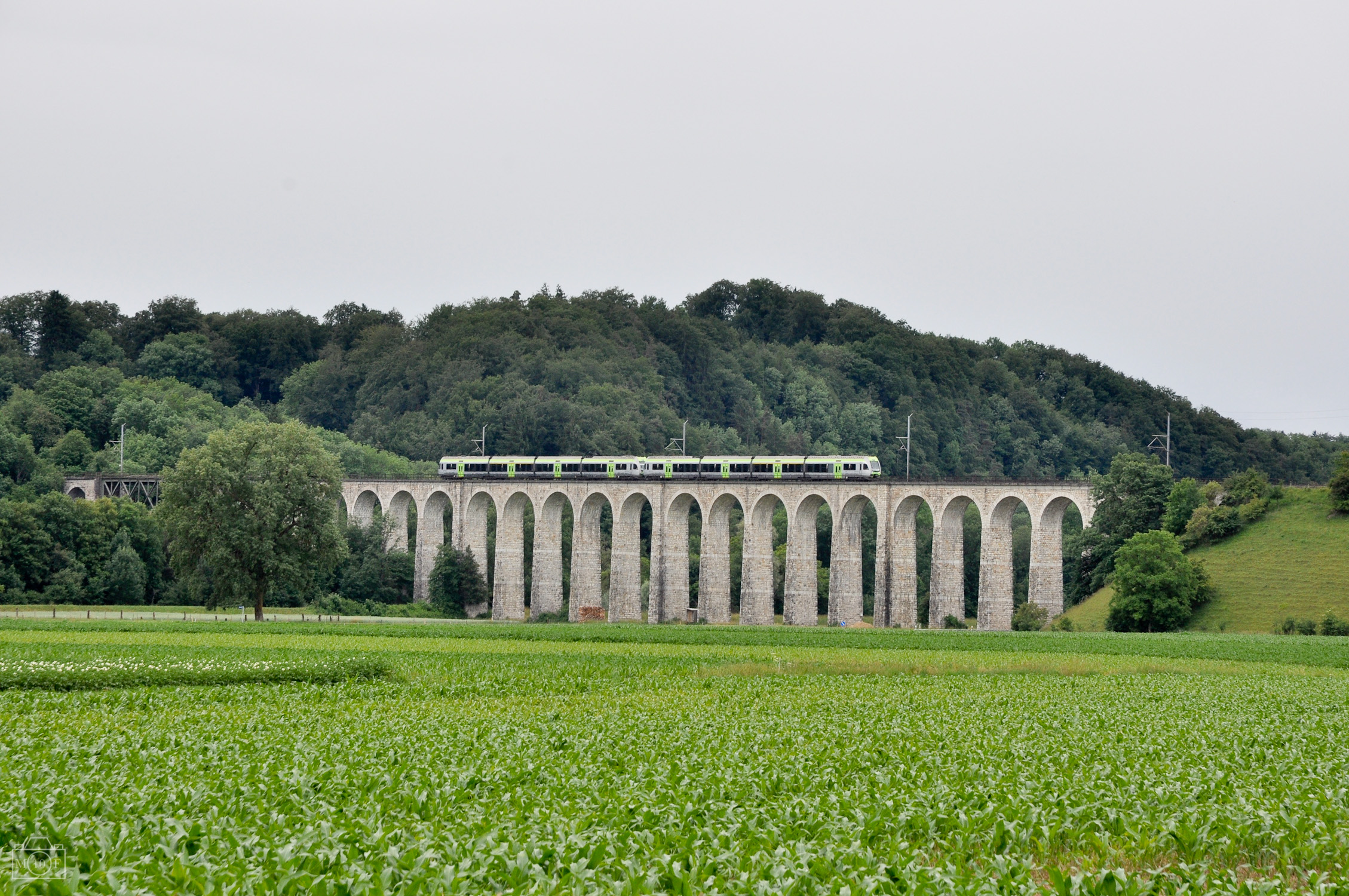 Eisenbahn-Viadukt BN über die Saane, Gümmenenau , Mühleberg